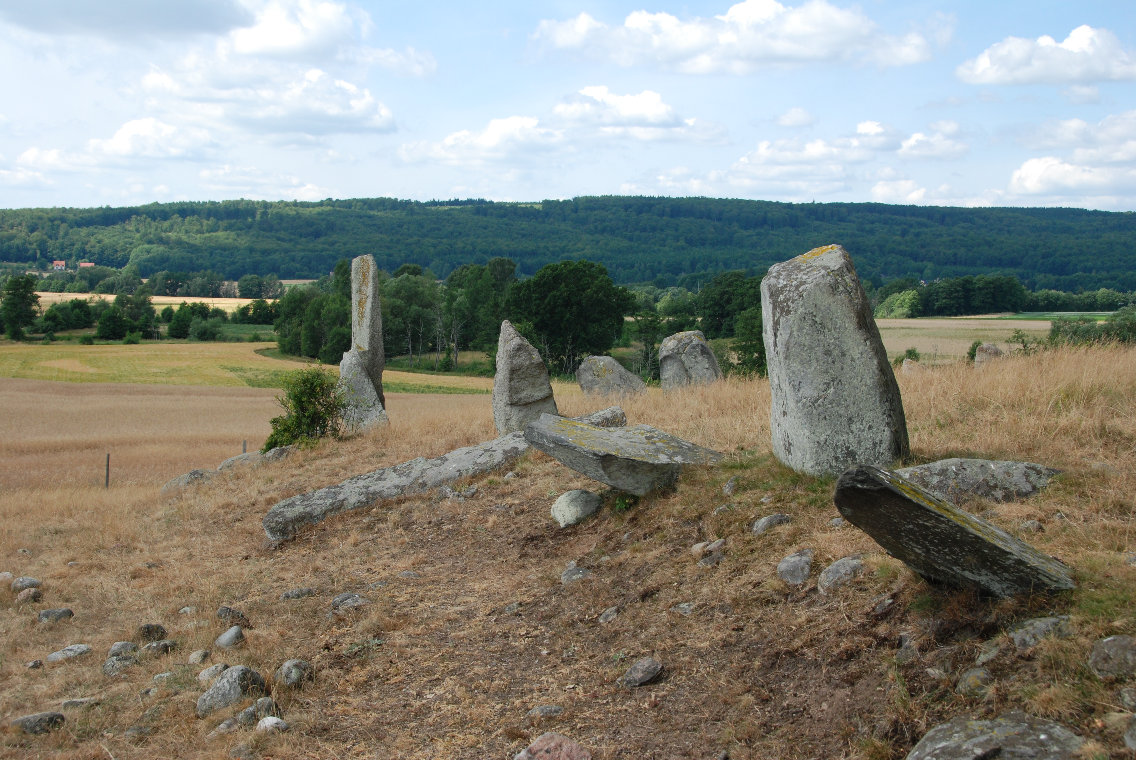 Gamla kyrkogård med Backar (Näsum 5:1)